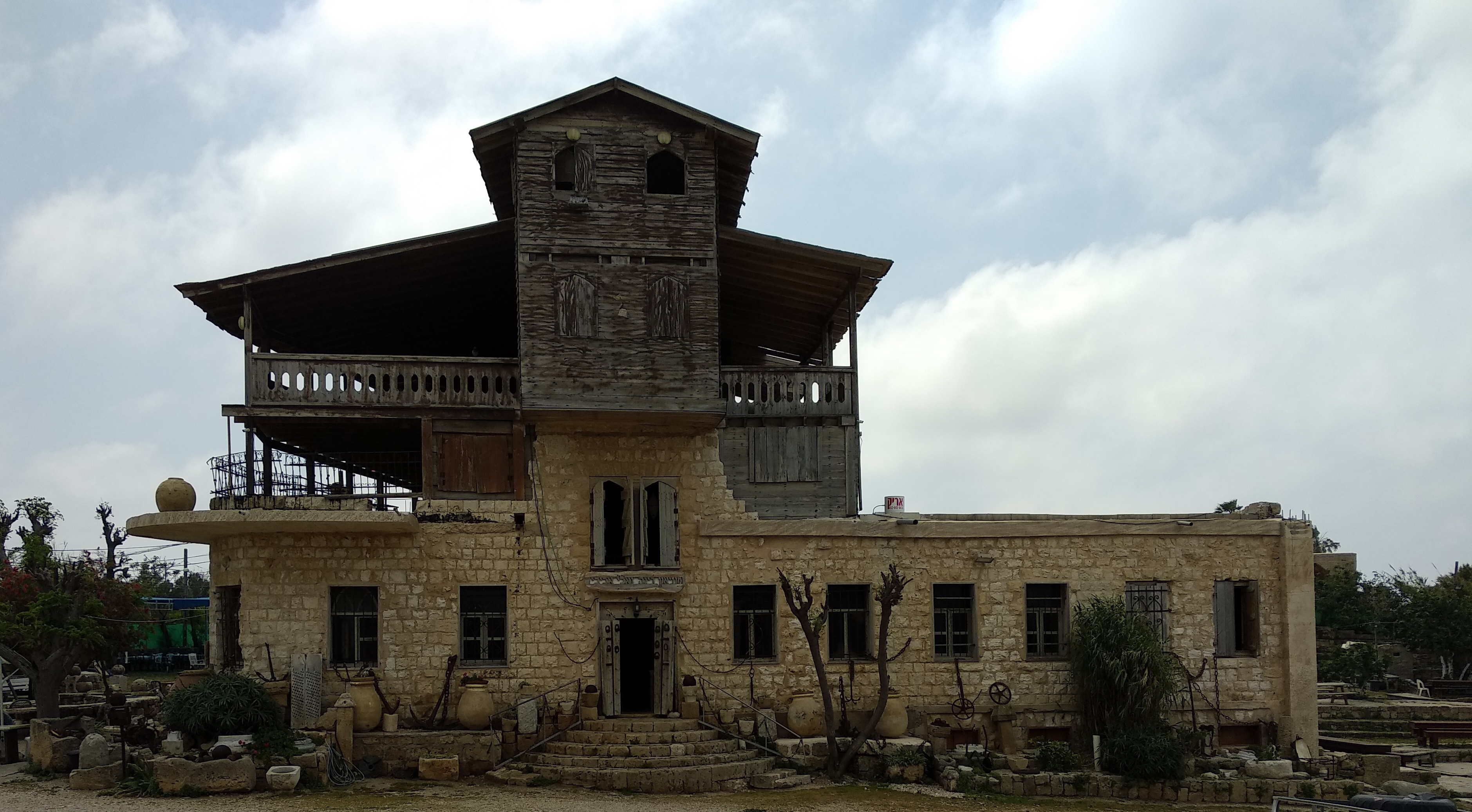 מוזיאון רינה ואלי אביבי במדינת אכזיב